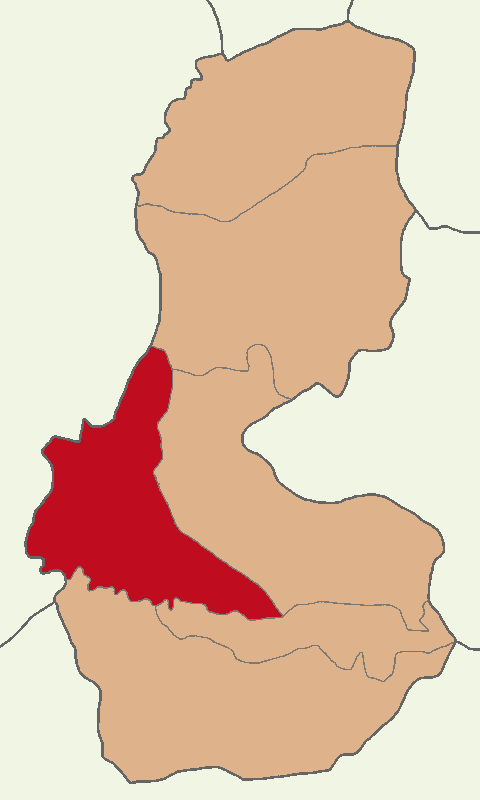 Batman Merkez ilçesinin konumu